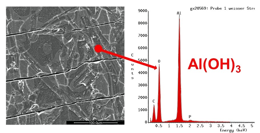 REM-Aufnahme und EDX-Fingerprint einer mit Al-Hydroxid zugewucherten Anodenoberfläche